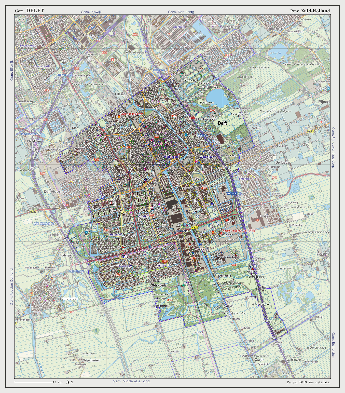 Topografische kaart van gemeente Delft (2013). Samengesteld door Jan-Willem van Aalst op basis van de GML open geodata van de BRT/Top10NL (basisregistratie Topografie, Kadaster 2011), vrijgegeven door Kadaster onder de Creative Commons BY licentie. Additionele gegevens uit BAG (8 juli 2013), uit de Open Street Map (9 juli 2013) en uit de Risicokaart. Peildatum kaartbeeld: 9 juli 2013. Zie ook Gemeentenatlas.nl Samenstelling en kleurenschema: Jan-Willem van Aalst, met QuantumGIS en Photoshop. Zie ook de Legenda.